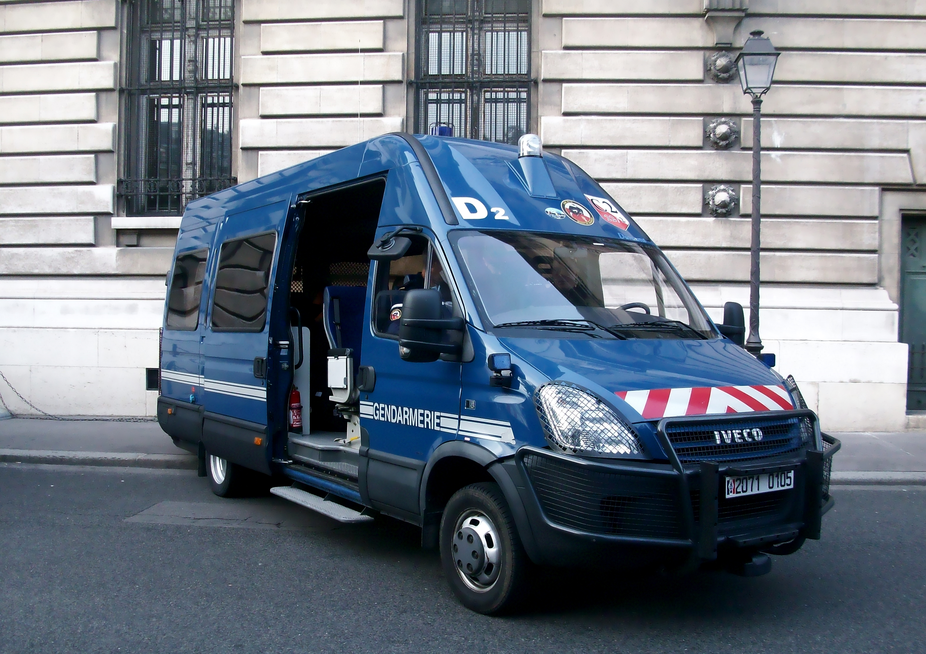 Camionnette de la gendarmerie mobile à Paris